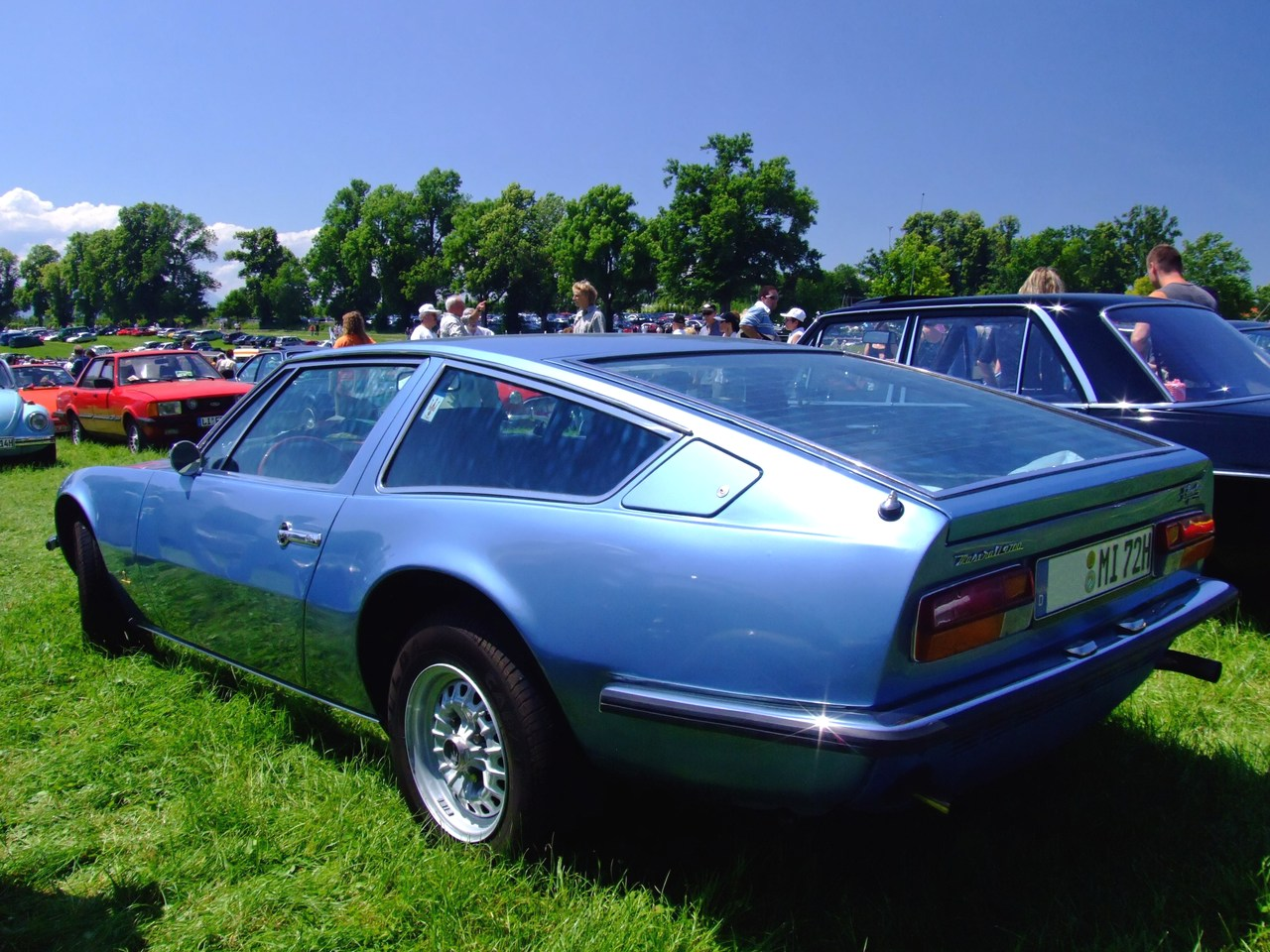 Quelle: selbst fotografiert, 06/2007 Fotograf: Späth Chr.